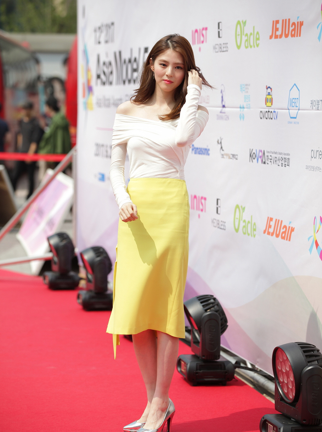 2017 아시아 모델 페스티벌 레드카펫